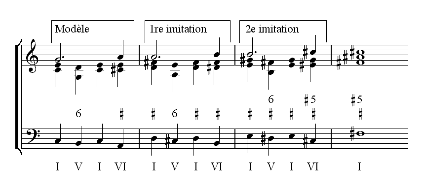 Description : Marche harmonique modulante Source : Personnelle Licence : GFDL